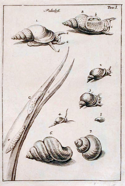 gravure tirée d'un ouvrage posthume, recueil d'illustrations scientifiques du naturaliste italien Giuseppe Ginanni